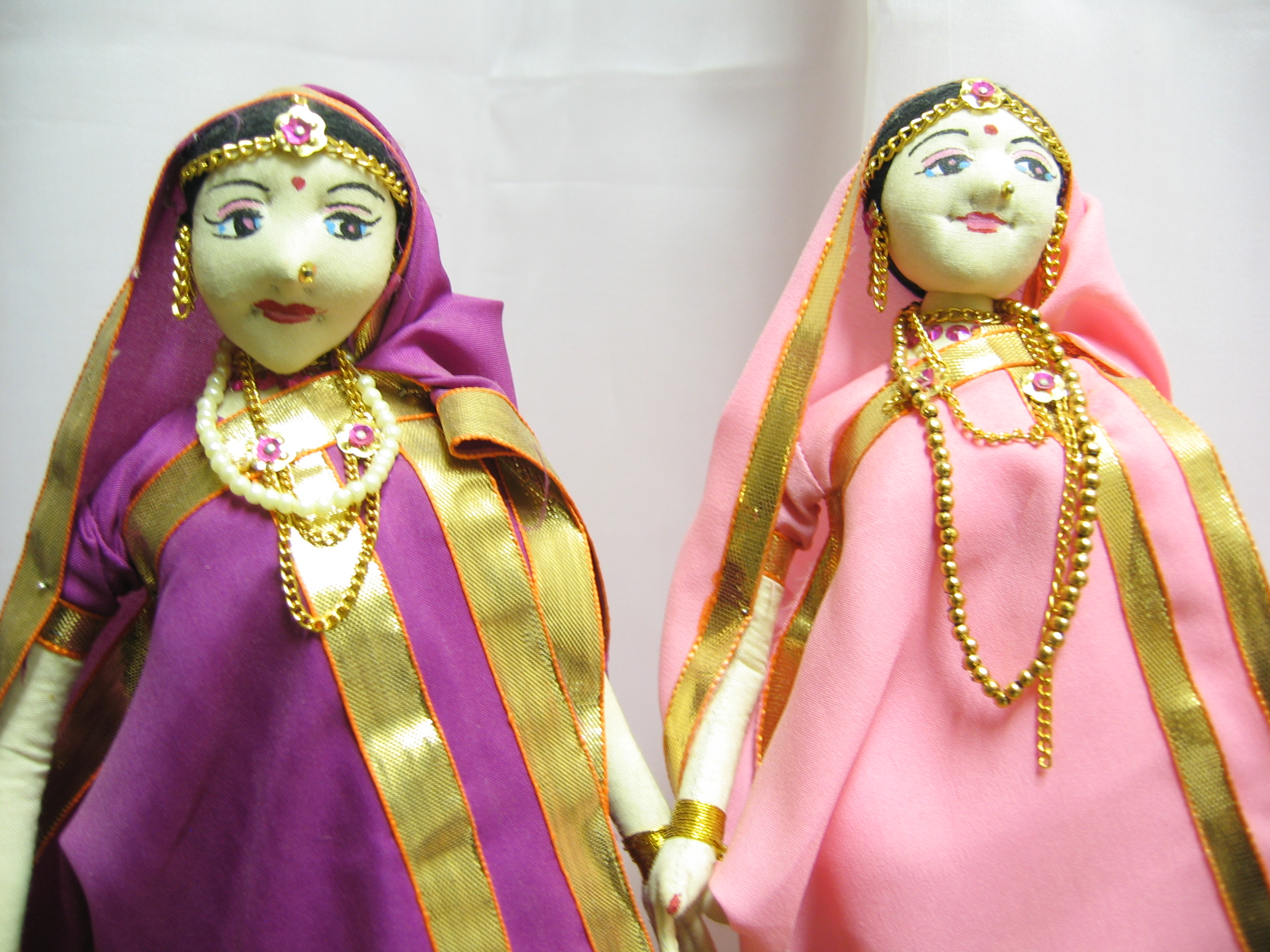 Jamindar Ginni Dolls from Aarong, Bangladesh.